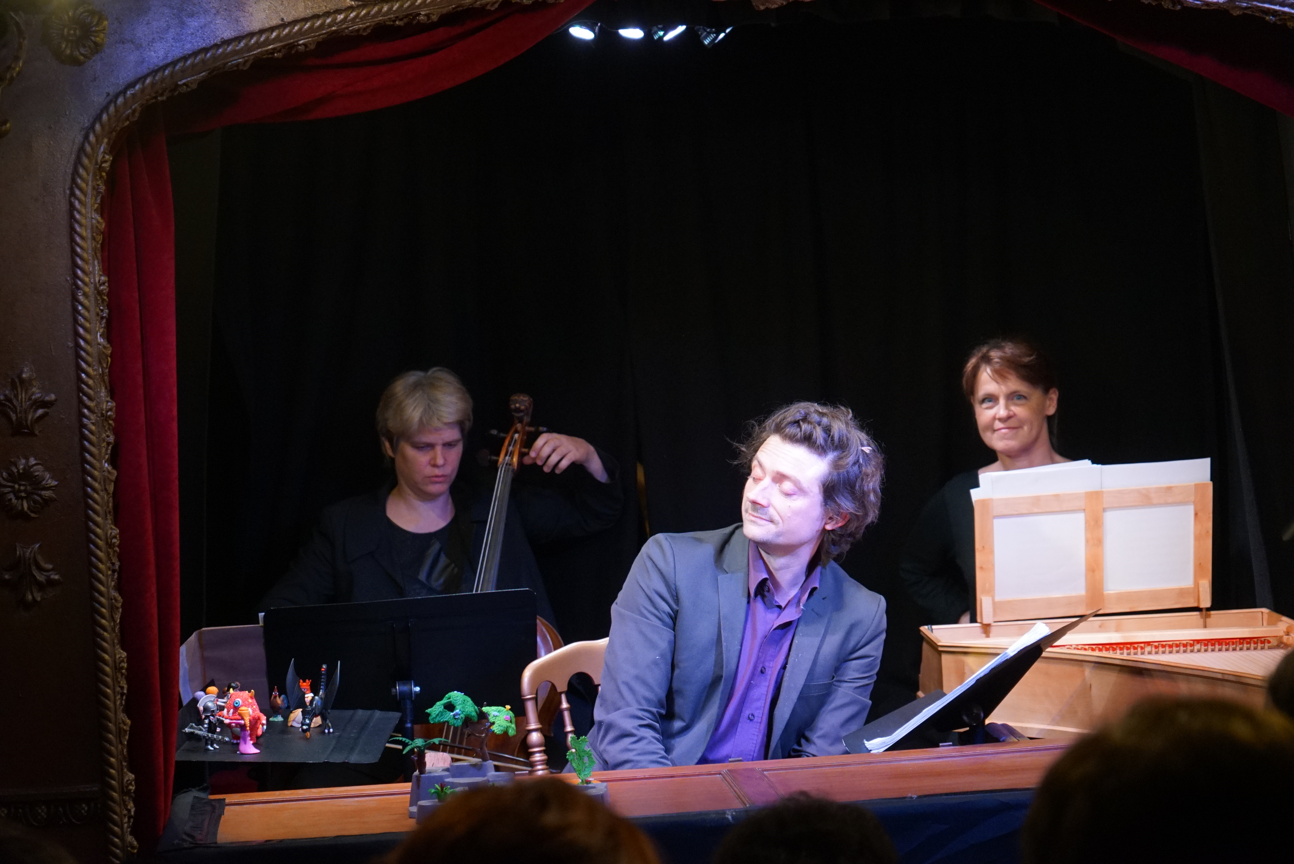 lors de "tous à l'opéra".